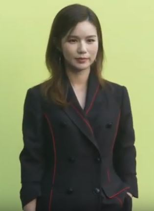 16일 오전 서울시 중구 동대문디자인플라자(DDP)에서 '2020 S/S 서울패션위크(SEOUL FASHION WEEK S/S 2020)' 까이에(CAHIERS) 김아영 디자이너의 컬렉션이 열려 황보라X박시은이 참석해 포토타임을 갖고 있다.